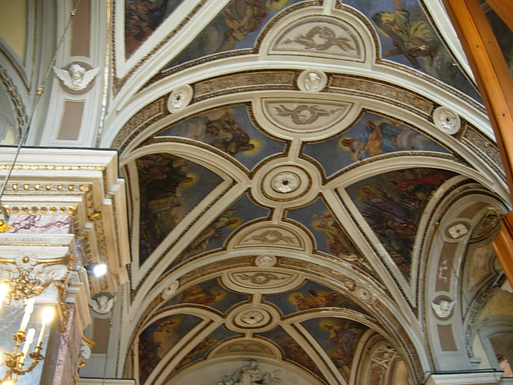 Chiesa di San Domenico Soriano in Napoli Foto personale concessa in PD